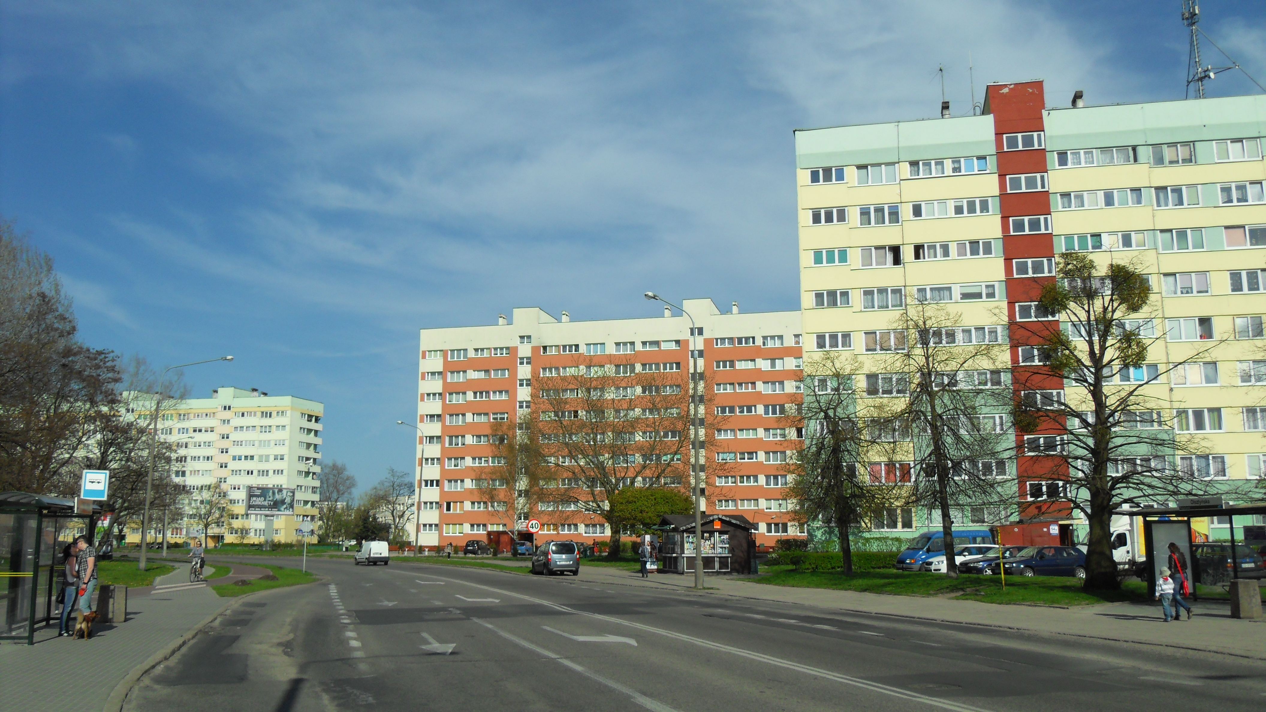 Gdańsk Przymorze Wielkie, ul. Kołobrzeska 58, 56 i 54 (tzw. bloki "leningradzkie"). Obszar historyczny Biały Dwór.